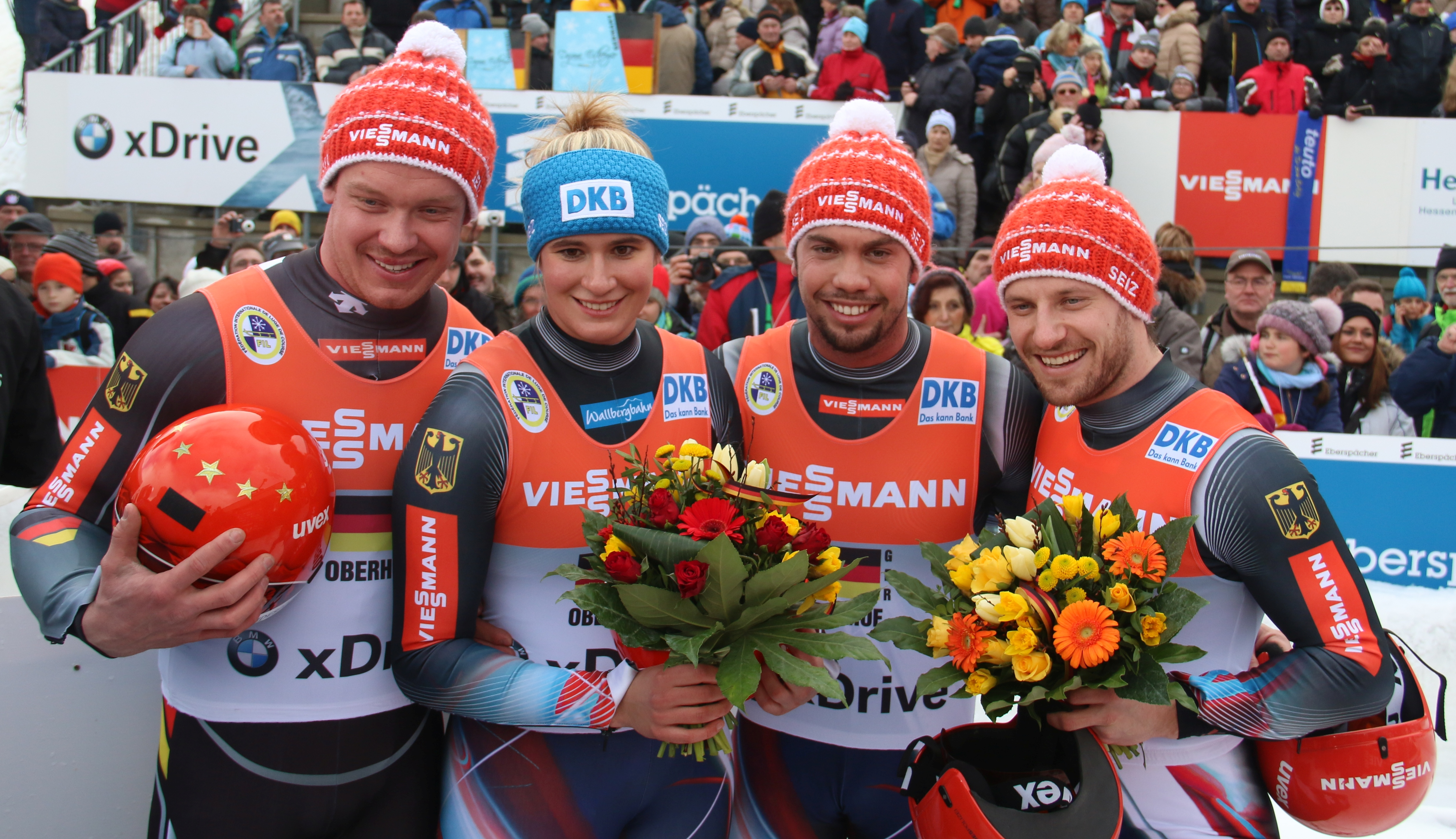 Teamstaffel Deutschland (Natalie Geisenberger, Felix Loch und Tobias Wendl/Tobias Arlt) beim Rennrodel-Weltcup 2017 in Oberhof